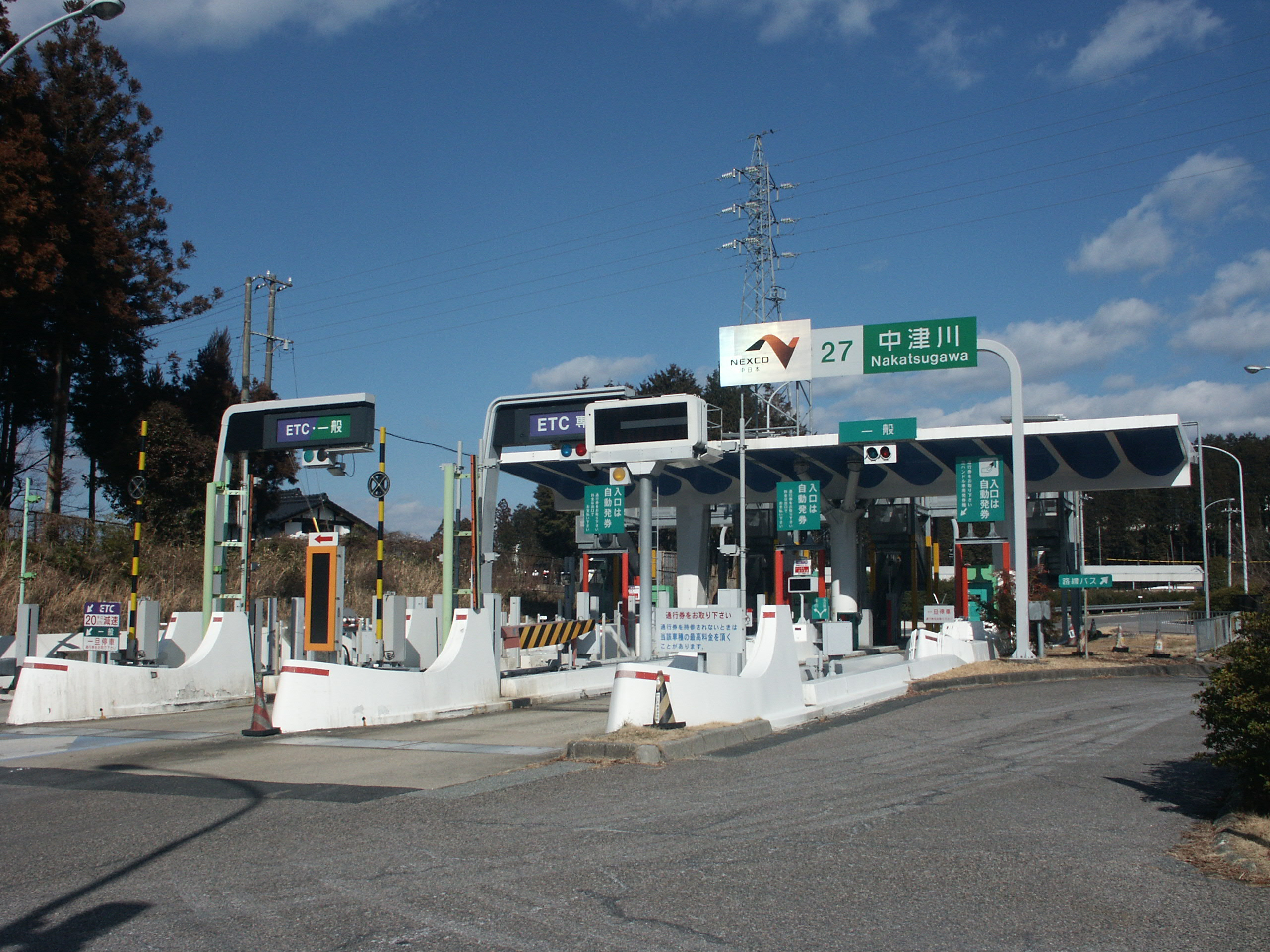 中央自動車道中津川IC入口側料金所